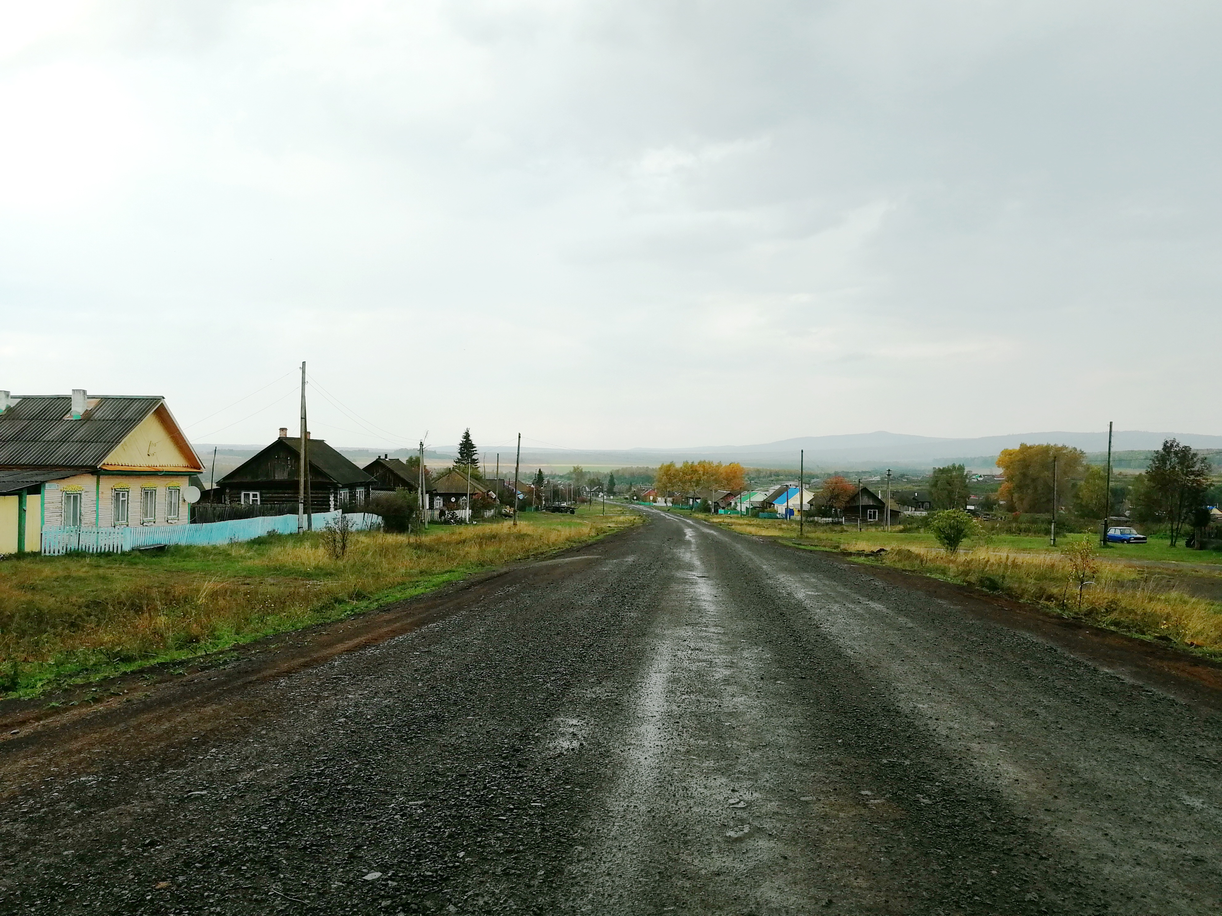 Аптрякова Челябинская область, улица летом